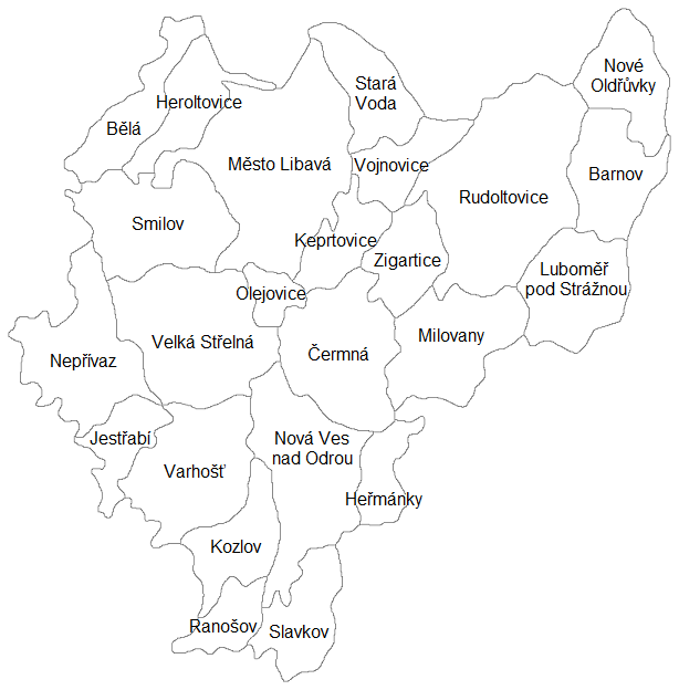 Katastry obcí na Libavé k roku 1948